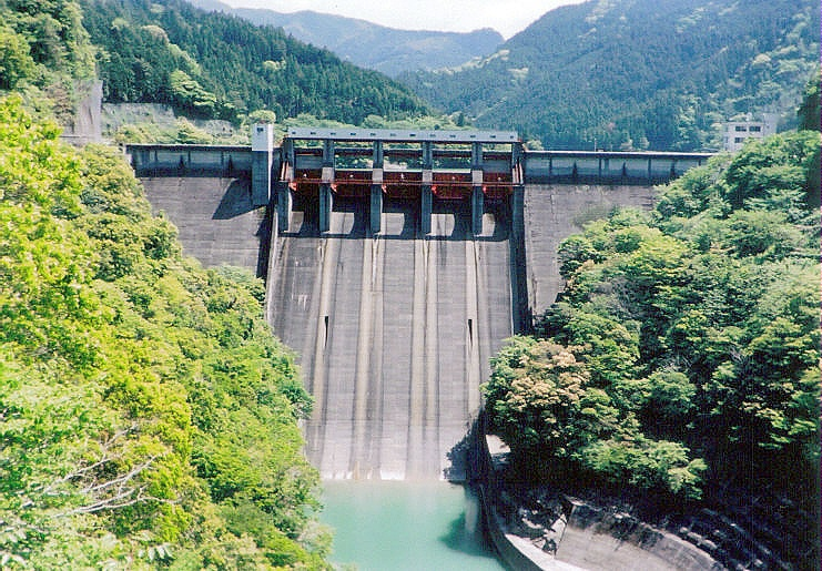 Dam